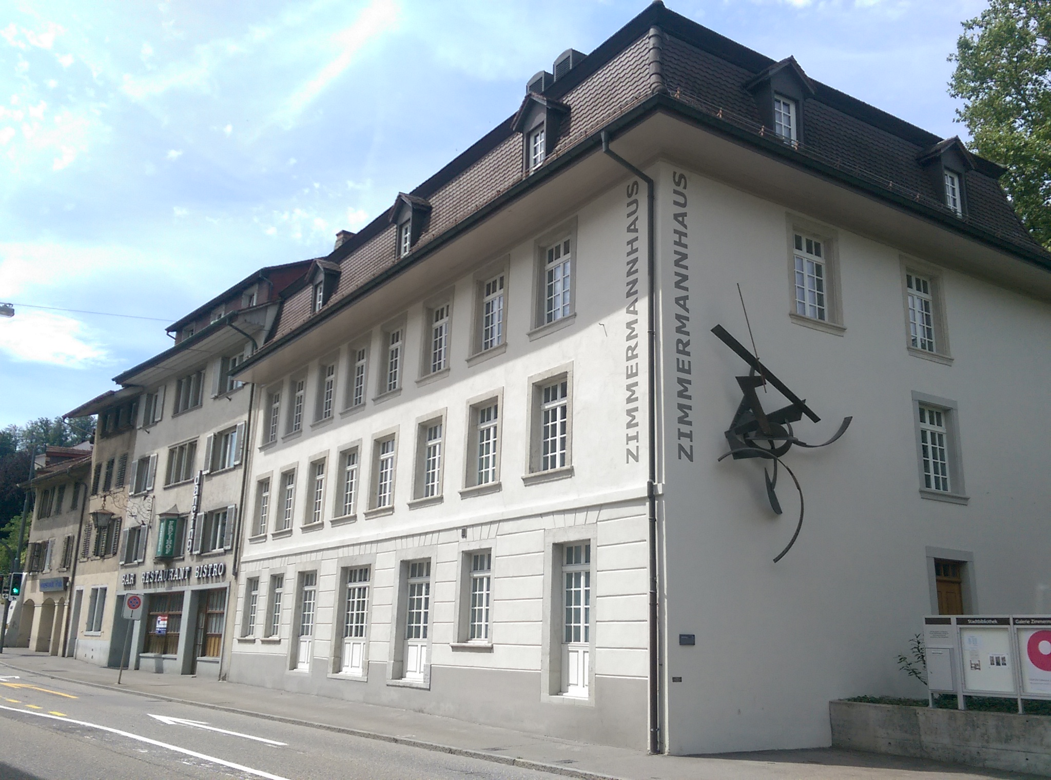 Das Stadtarchiv von Brugg (von aussen), das Gebäude beherbergt auch die Stadtbibliothek